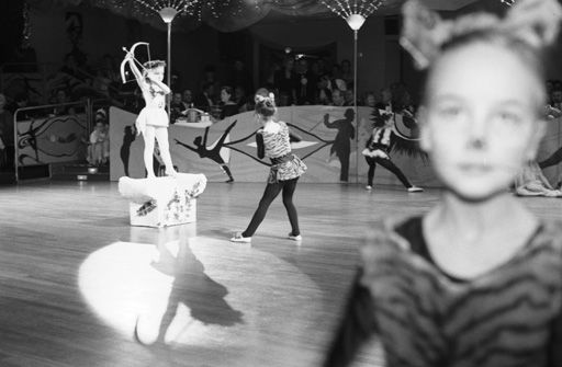 Kindervorstellung. Chrysanthemenball im Deutschen Theater München